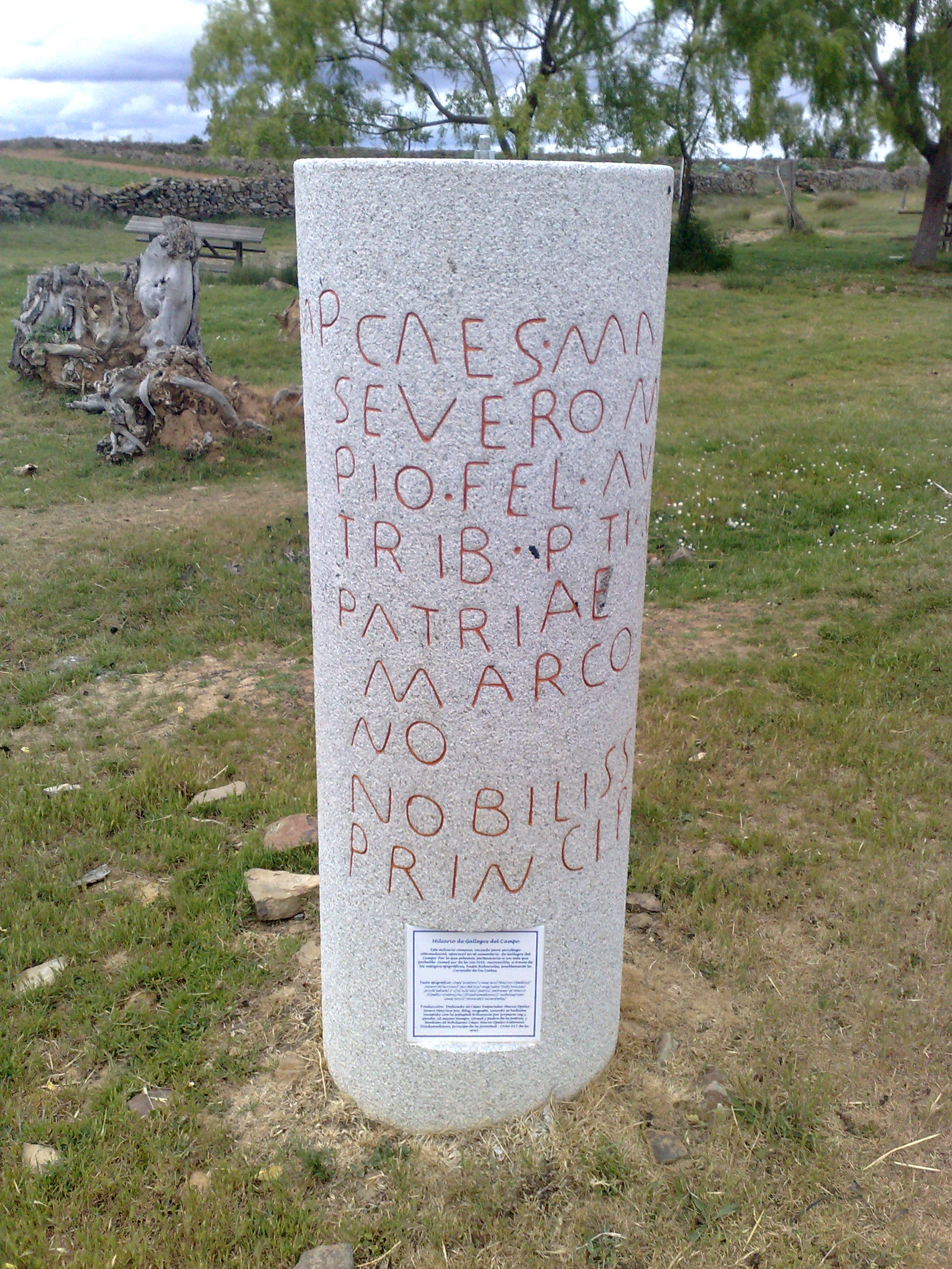 Réplica del miliario de la Vía XVII del Itinerario de Antonino que pasa cerca de Gallegos del Campo